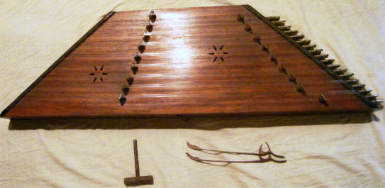 santur